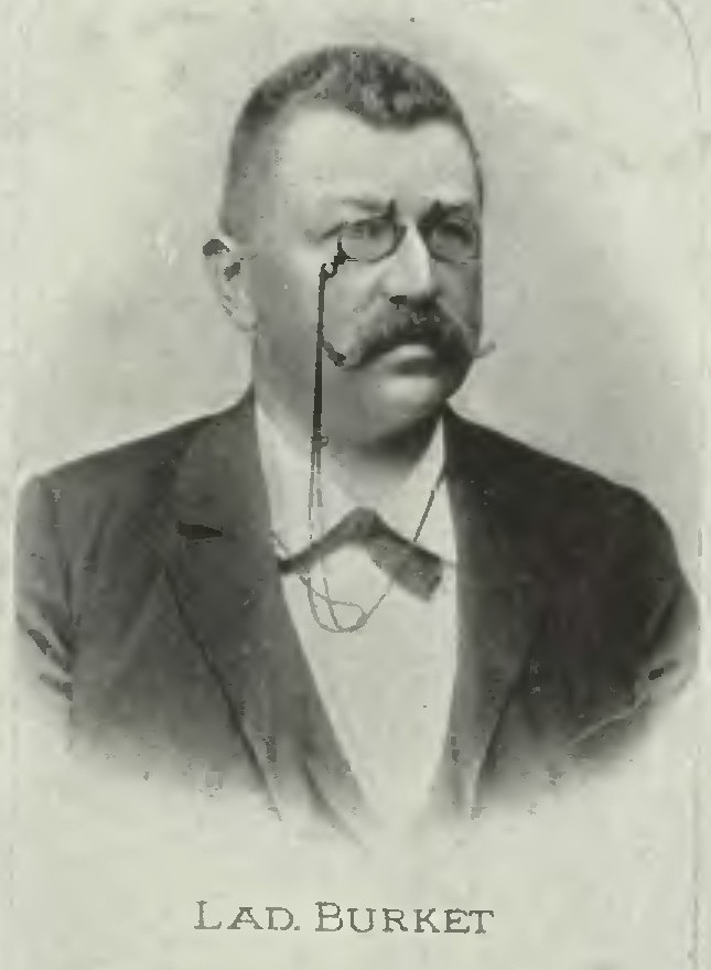 Portrét – Ladislav Burket (1855-1933), Český entomolog.